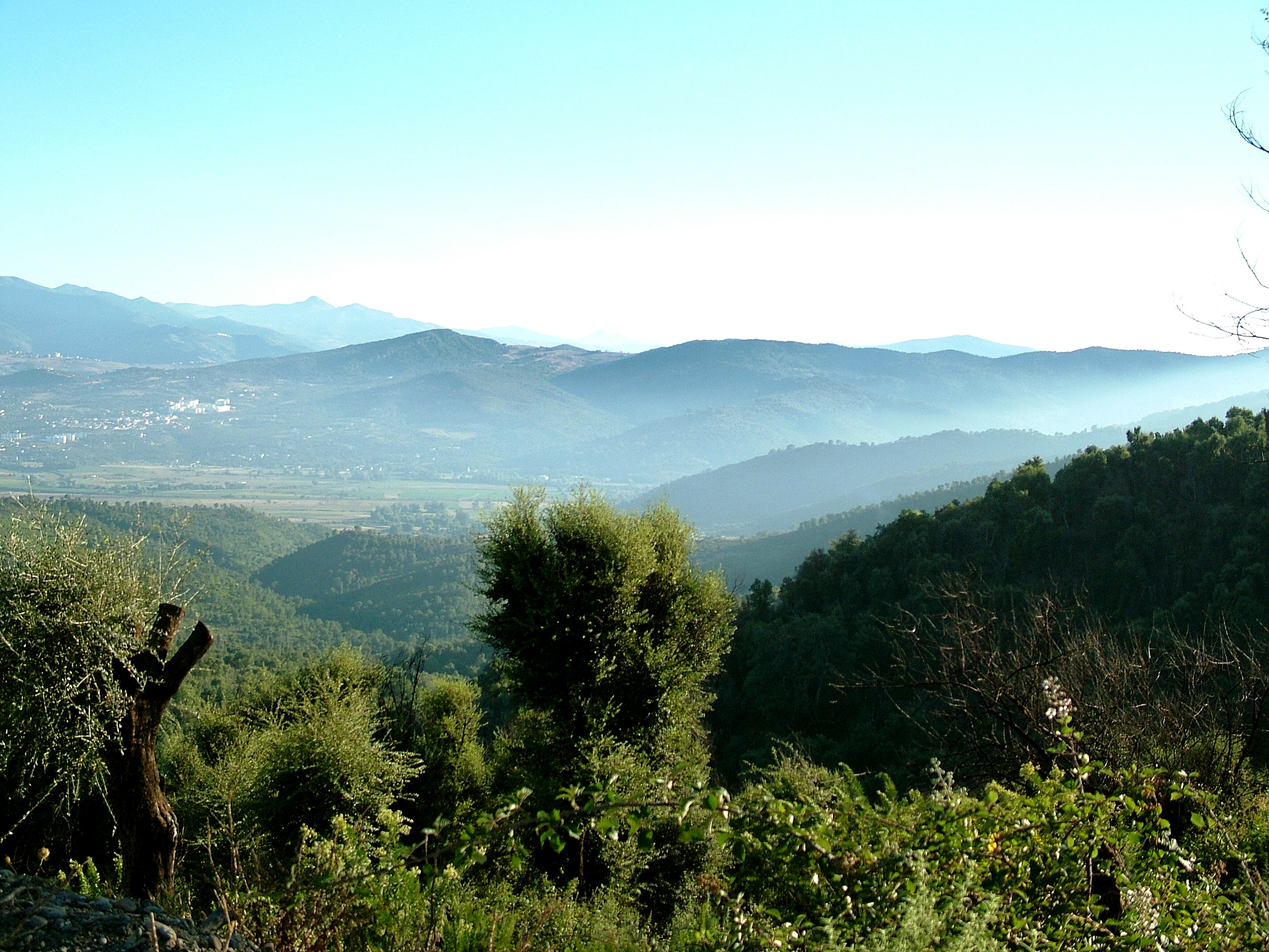 Belle nature à El Milia (Algérie).